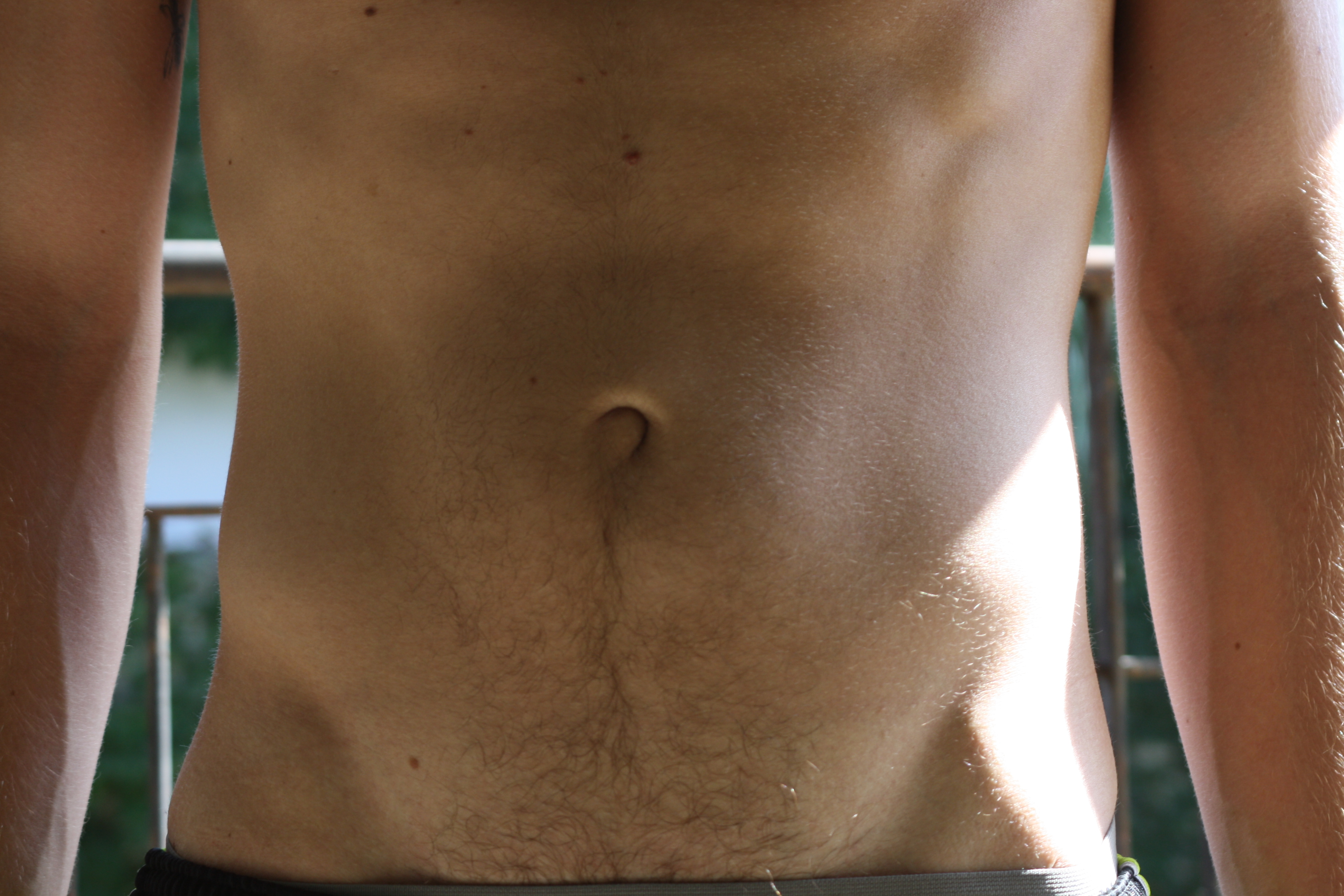 בטן של גבר